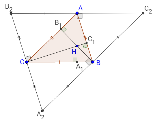 Дане зображення є ілюстрацією до доведення теореми про перетин висот в трикутнику.